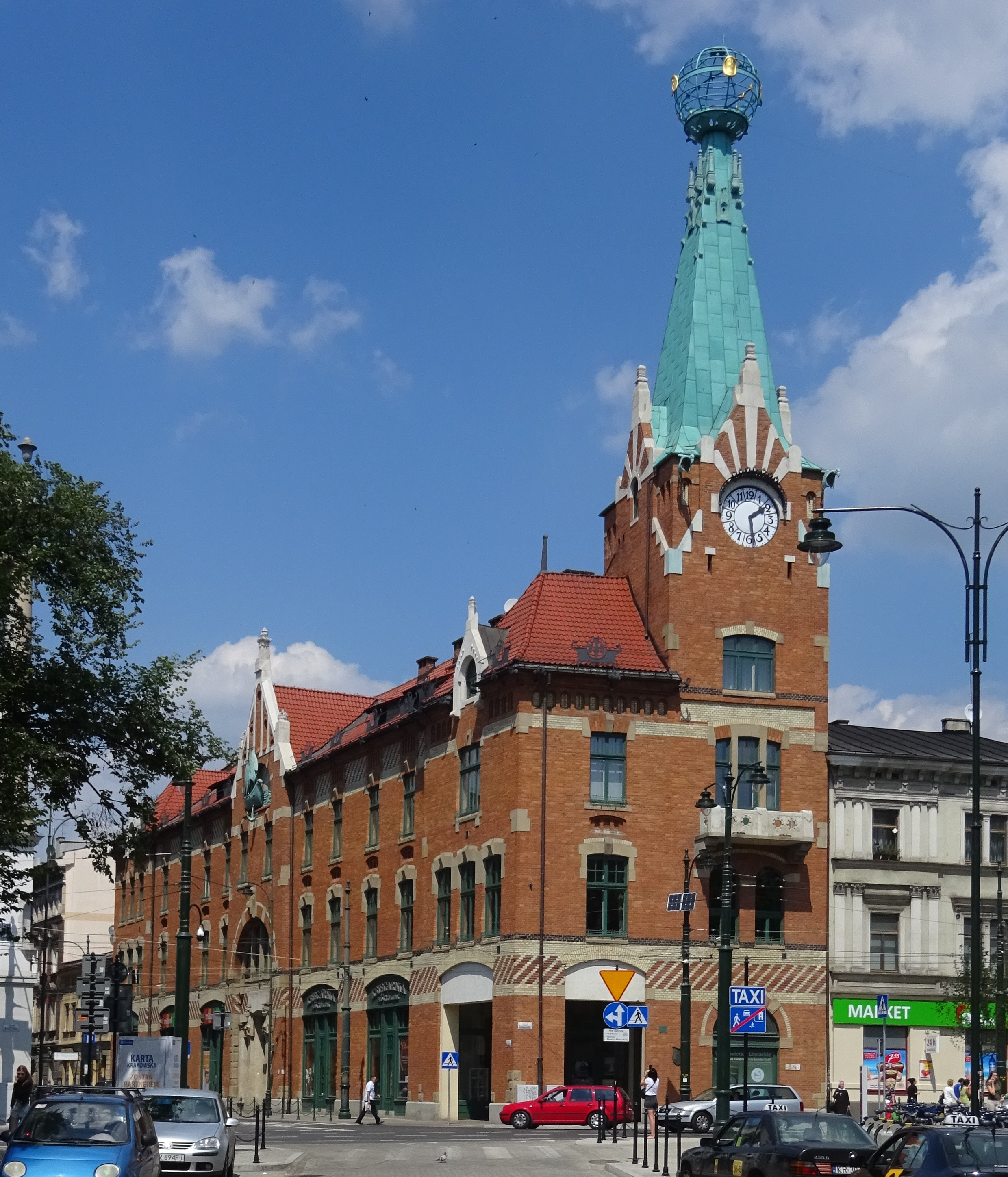 Dom Pod Globusem w Krakowie. Widok z południa, od ulicy Sławkowskiej. 2018